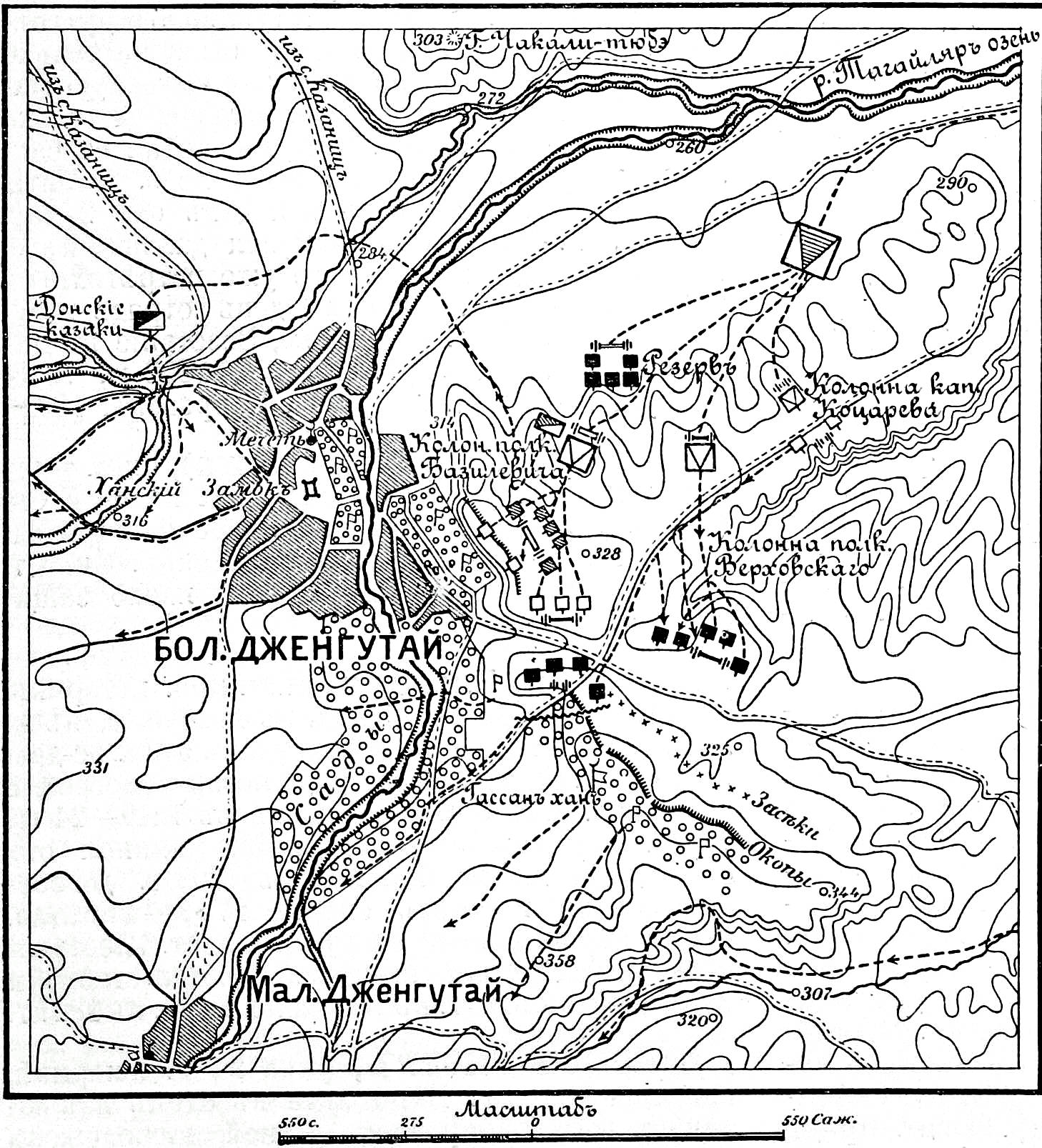 Это изображение было использовано для иллюстрирования статьи «Дженгутай» опубликованной в девятом томе «Военной энциклопедии», который был издан книгоиздательским товариществом И. Д. Сытина в 1912 году в столице Российской империи городе Санкт-Петербурге.